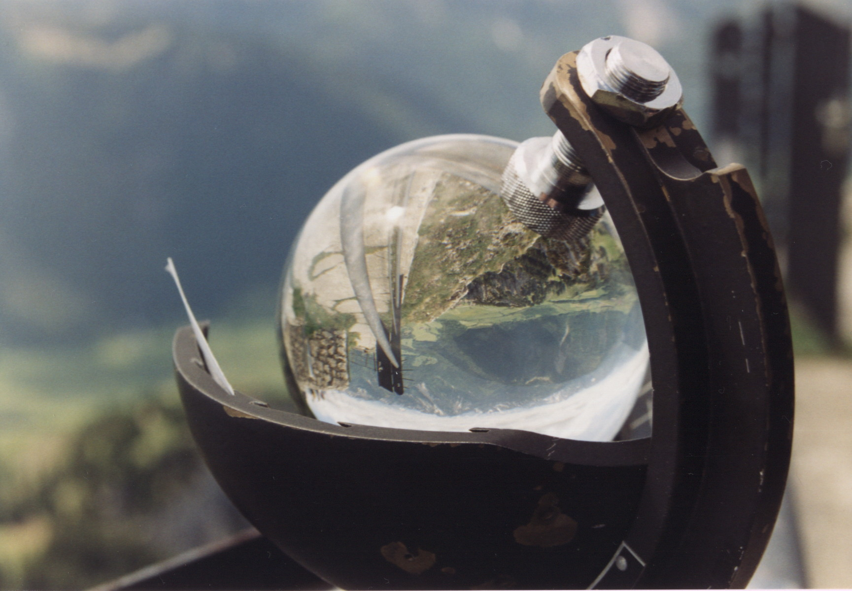 Heliograph (Sonnenscheinautograph, Sonnenscheinmessgerät), Wendelstein